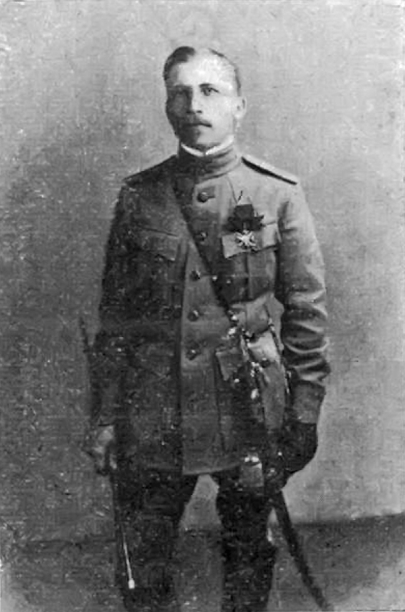 Тихон Харитонович Афонасьев (иногда Афанасьев; 14 июня 1884, Оренбургская губерния — после 1919) — войсковой старшина, начальник штаба Стерлитамакского корпуса (1919).